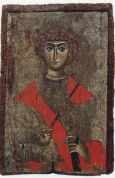 Αμφιπρόσωπη εικόνα με τον Άγιο Γεώργιο και τον Άγιο Ανδρέα Β΄ μισό 12ου αι. - Α΄ μισό 18ου αι. Βέροια, Ιερός ναός Αγίου Ανδρέα